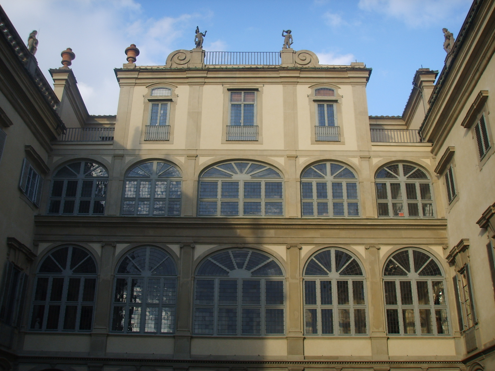 Palazzo_Corsini_sul_Lungarno,_Cortile_interno